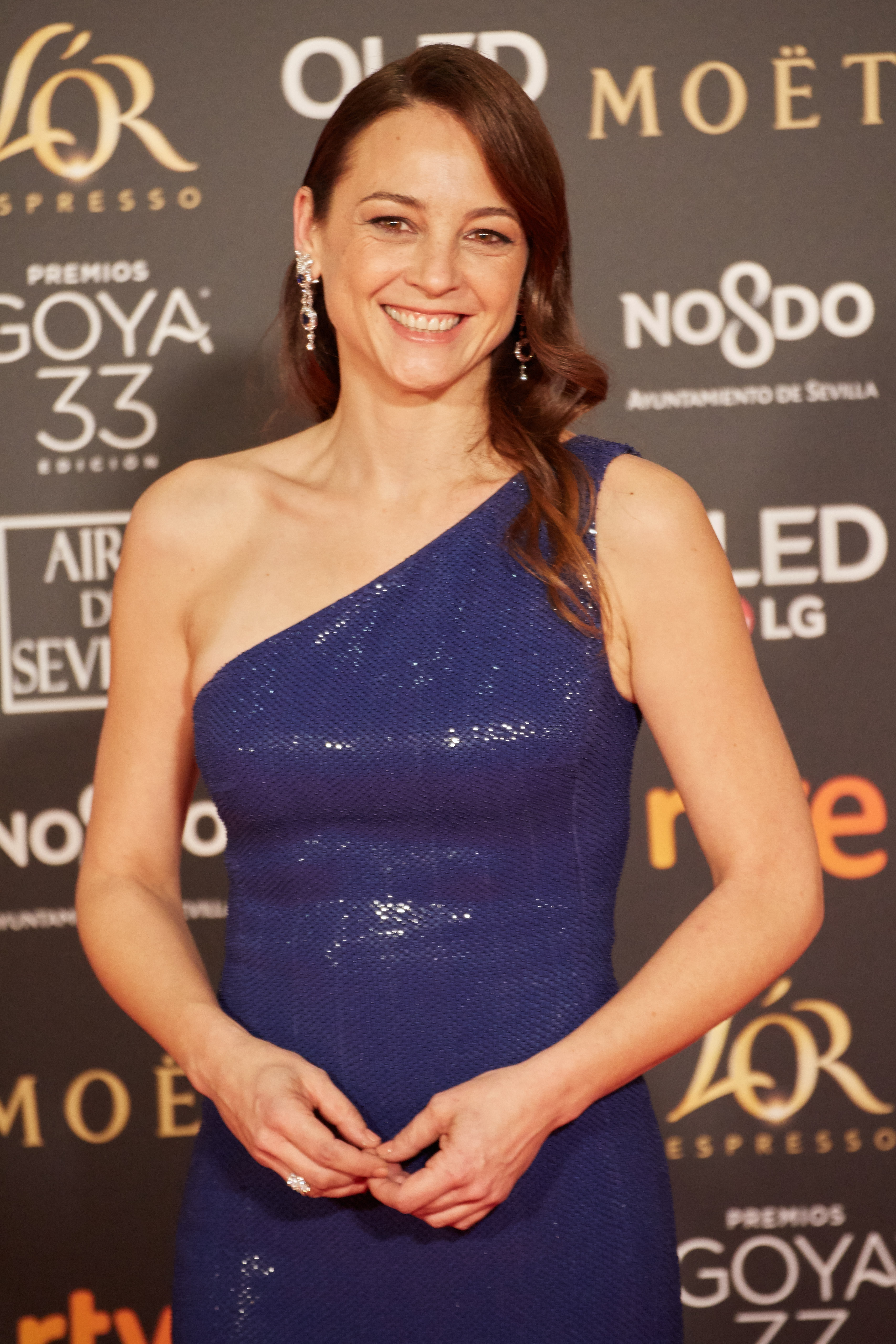 Leonor Watling en la alfombra roja de los Premios Goya celebrados en Sevilla en Febrero 2019